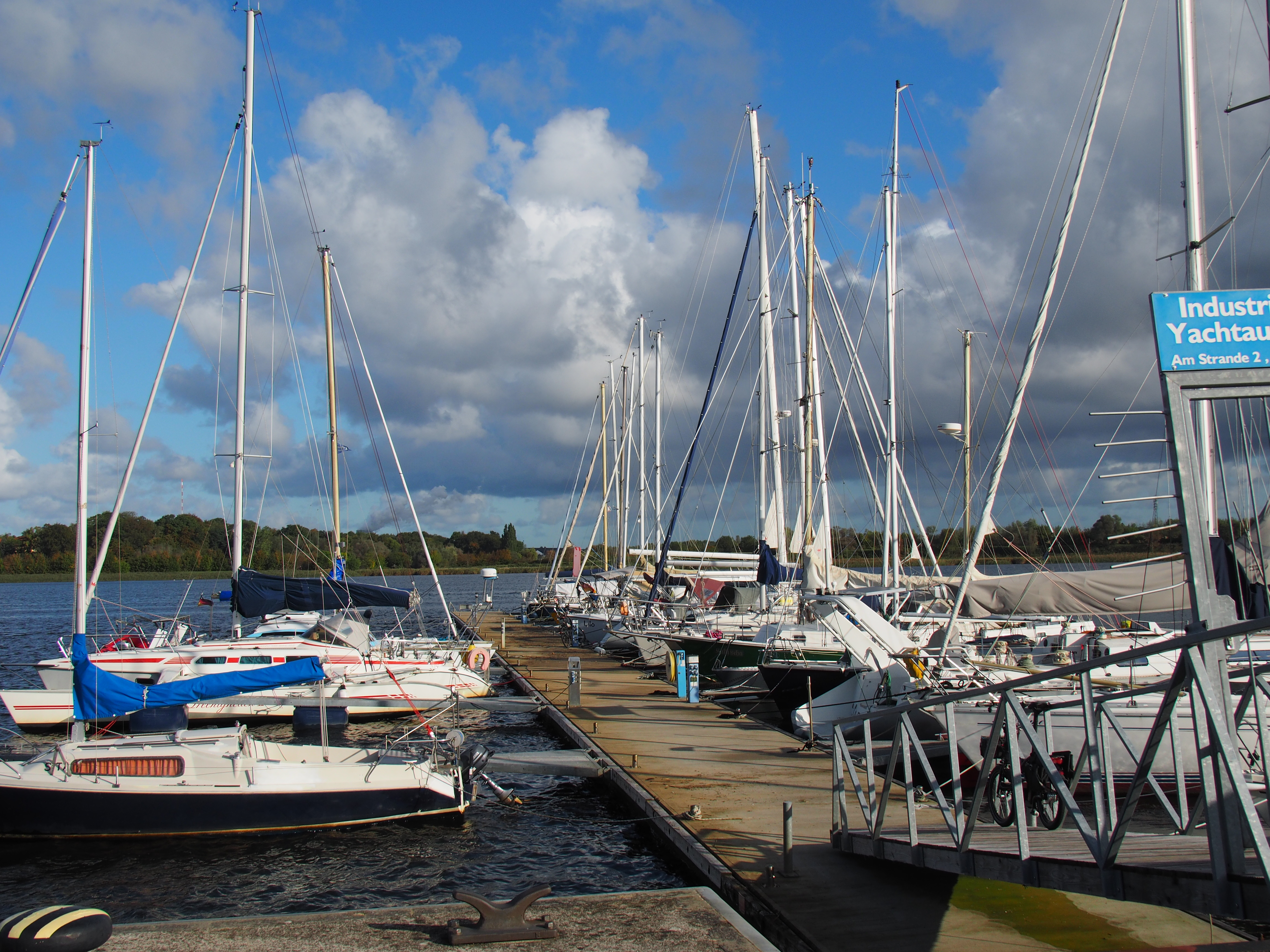 Yachthafen am Kempowski–Ufer im Rostocker Stadthafen